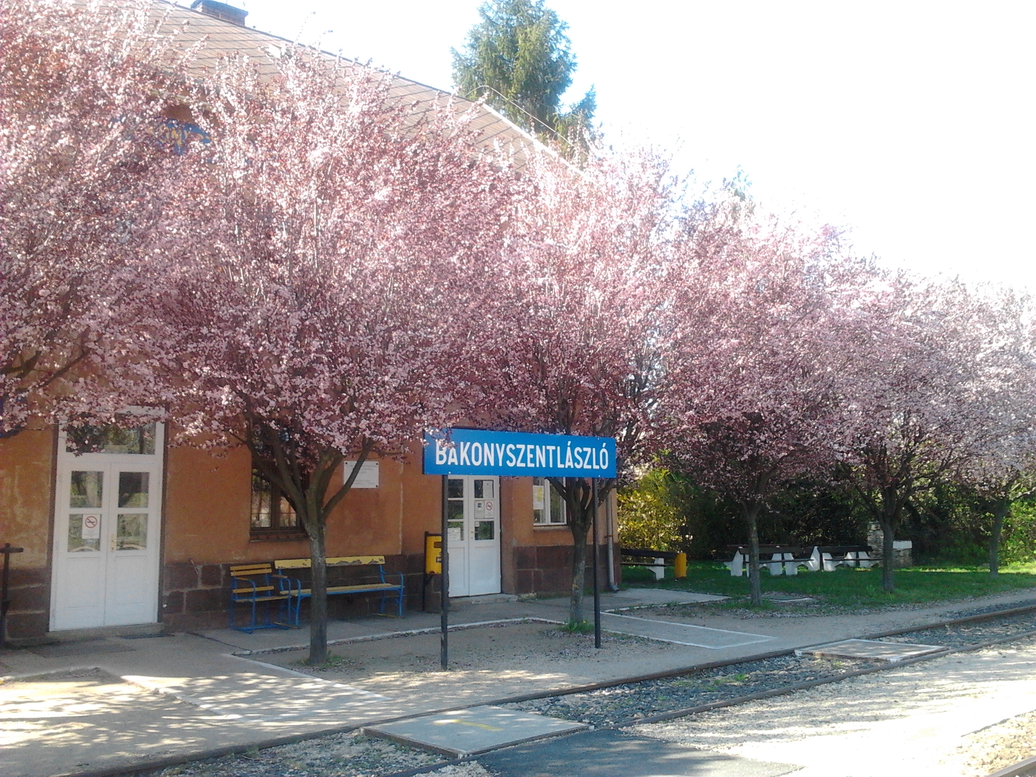 Bakonyszentlászló vasútállomása tavasszal.